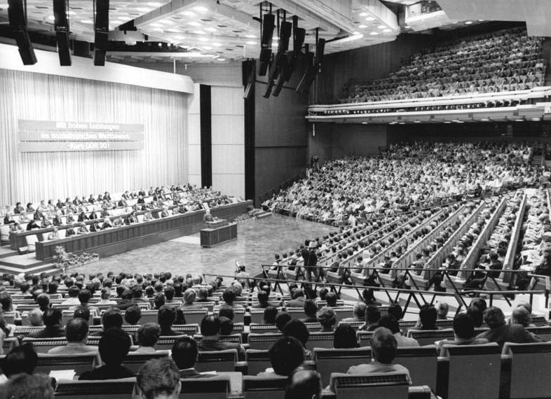 ADN-ZB Reiche-20.9.1979 Berlin: Bestarbeiterkonferenz-Etwa 3 000 verdiente Werktätige aus Betrieben und Einrichtungen der DDR-Hauptstadt zogen auf der 4. Berliner Konferenz der Bestarbeiter Bilanz im Wettbewerb "Kurs DDR 30"."